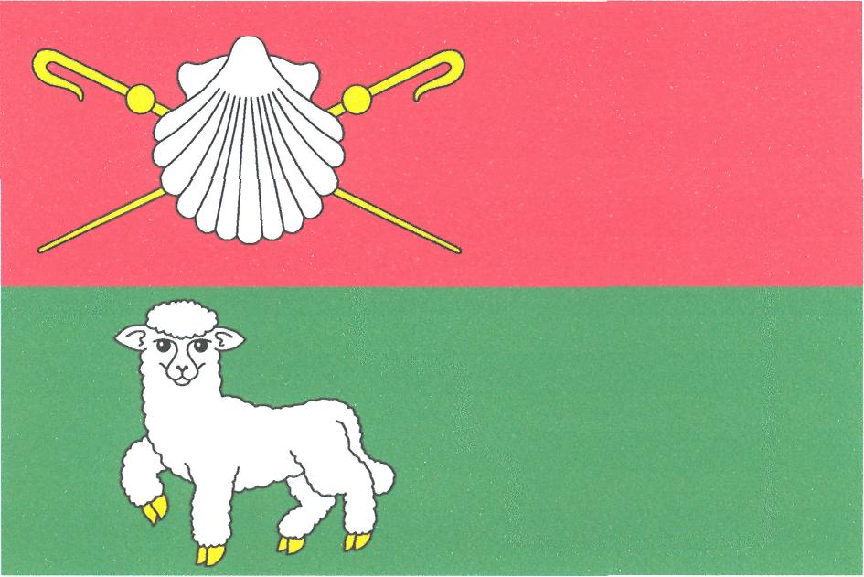 Vlajka obce Ovčáry (okres Kolín)